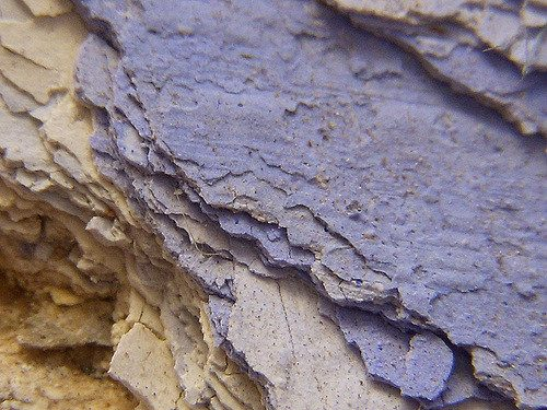 Nell'immagine notiamo i diversi strati di azzurro che si sono susseguiti negli anni